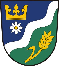 Nenačovice